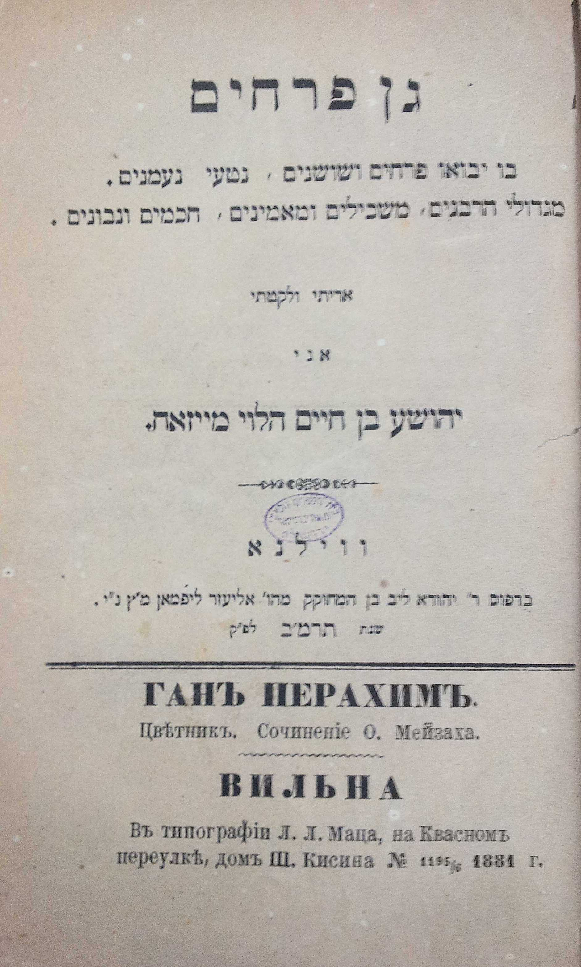 דף הפתיחה של הכרך הראשון של "גן פרחים"